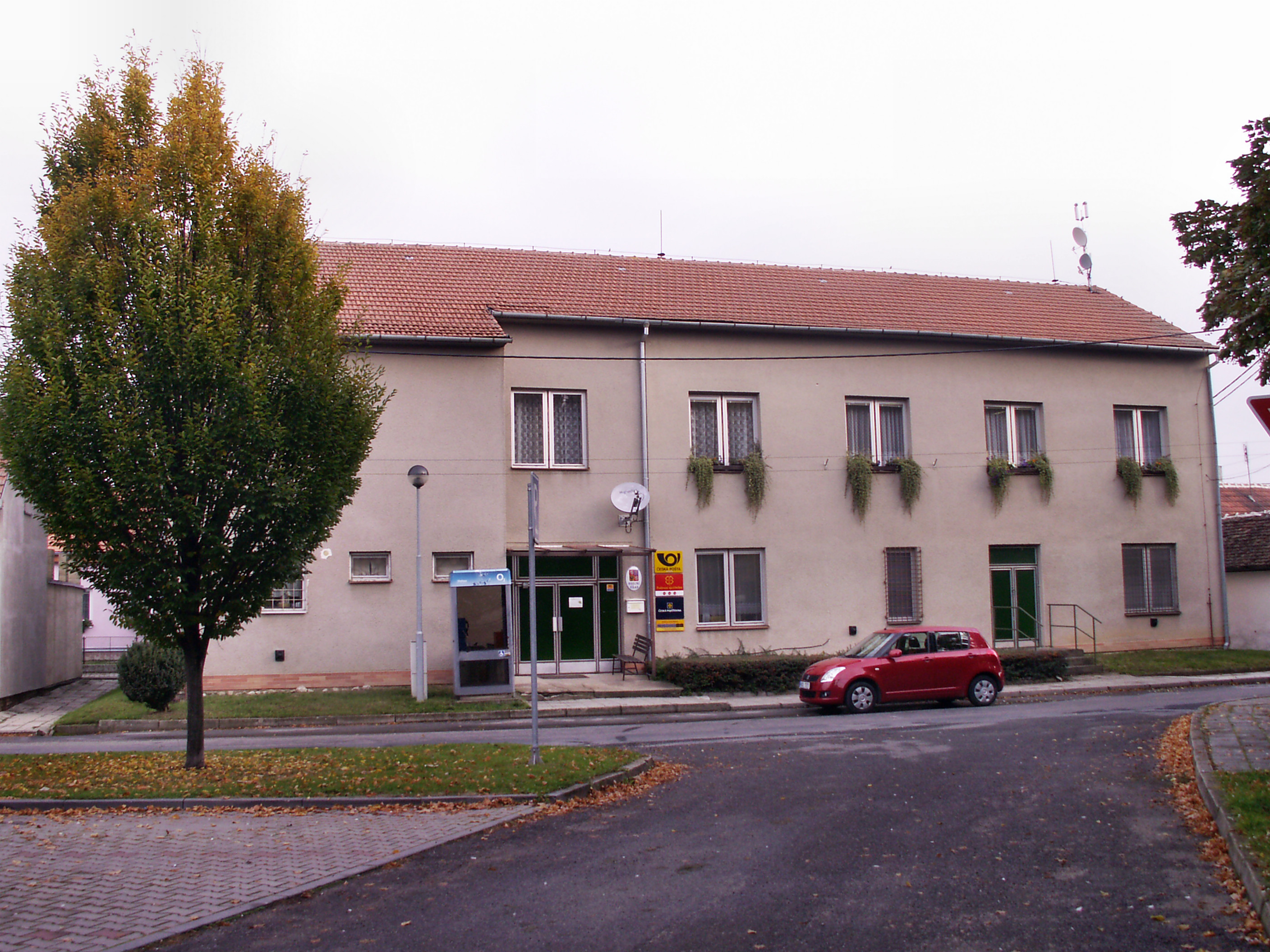 Křižanovice (okres Vyškov) - budova obecního úřadu, poštovního úřadu